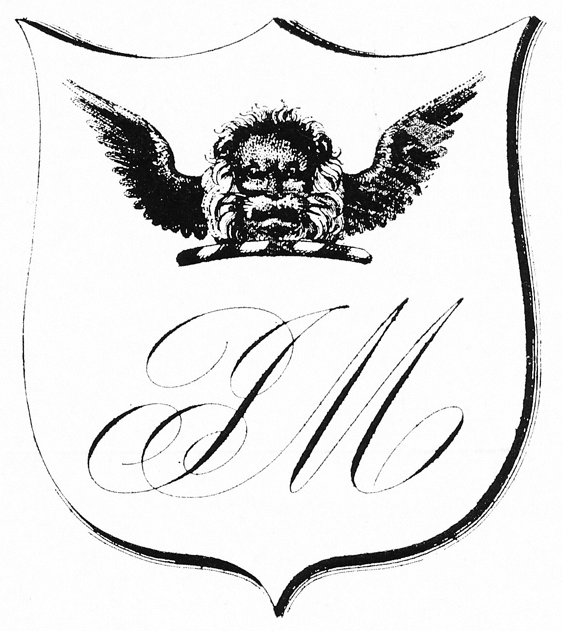 Cachet de Joseph Masson avec son monogramme, qui se retrouvait sur ses ex libris. On voit aussi une tête de vieillard avec lunettes et moustache, qui est à l'origine de la tête de griffon ailée qui se retrouvera par la suite dans le blason de son fils Louis-Rodrigue Masson, qui en aura un parce qu'il a été lieutenant-gouverneur. Version avec transparence